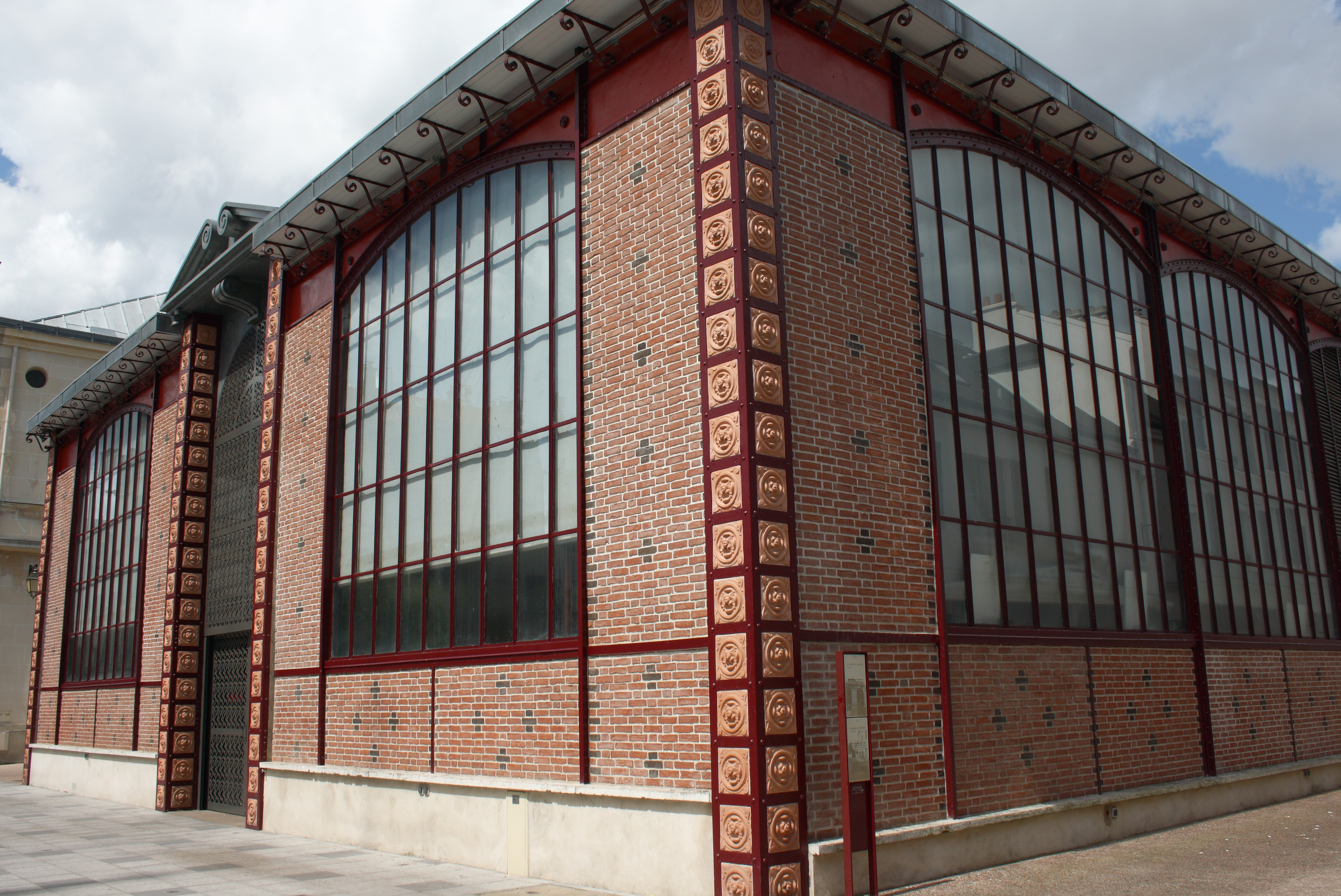 Markthalle in Sceaux im Departement Hauts-de-Seine bei Paris, 64 avenue du Président Franklin Roosevelt